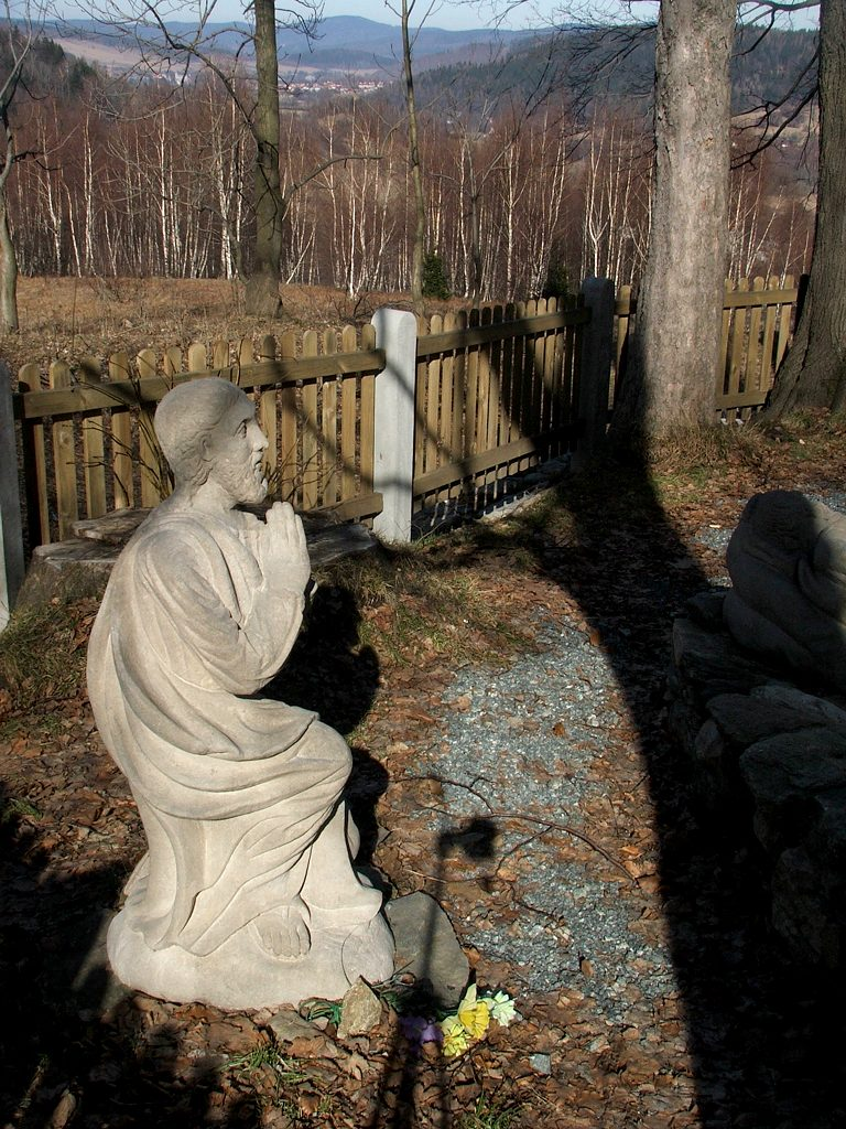 Góra Oliwna w Bolesławowie (Dolny Śląsk, Polska) – anioł